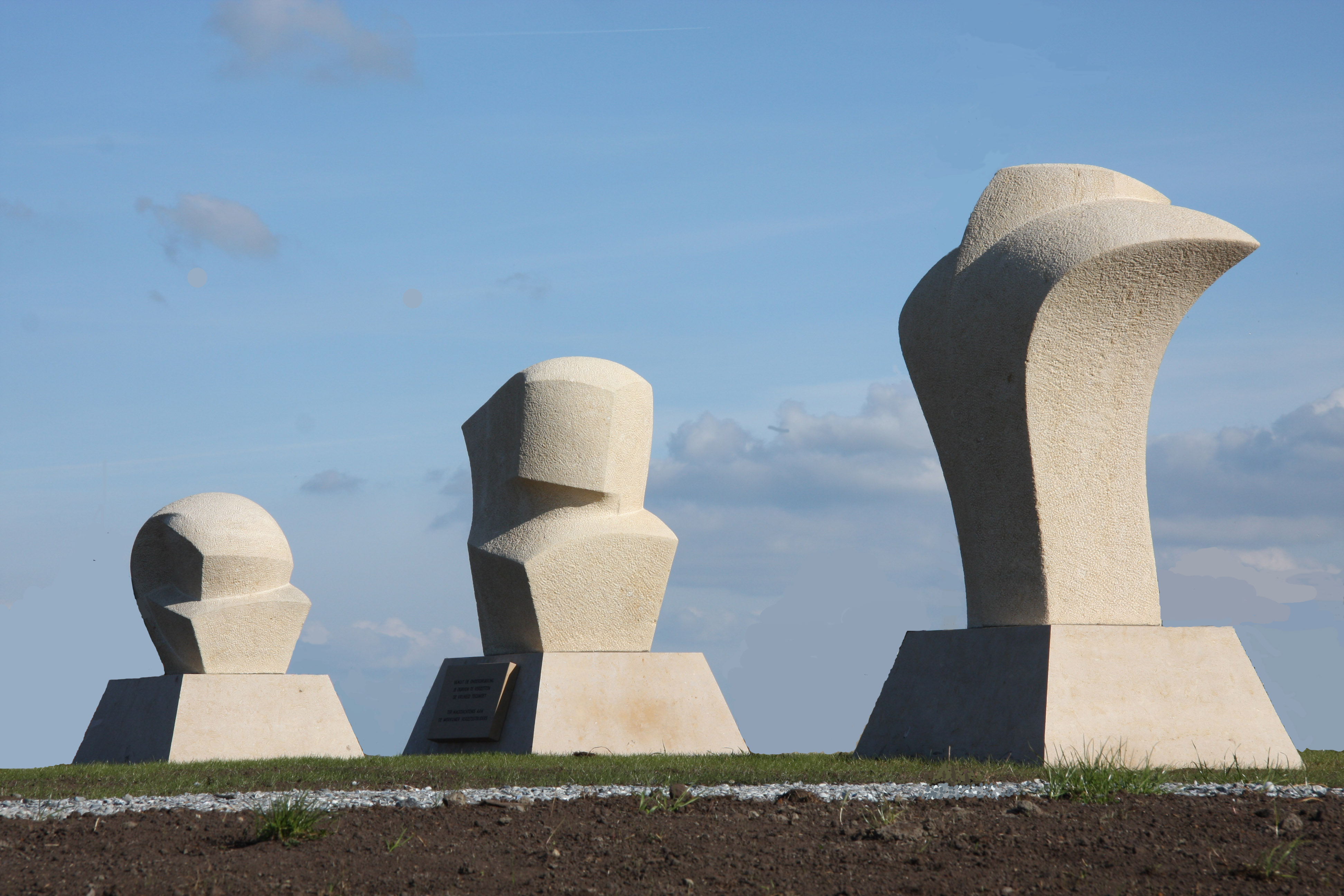 Monument